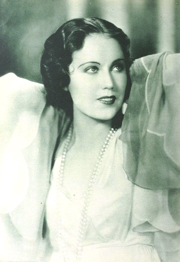 Fay Wray